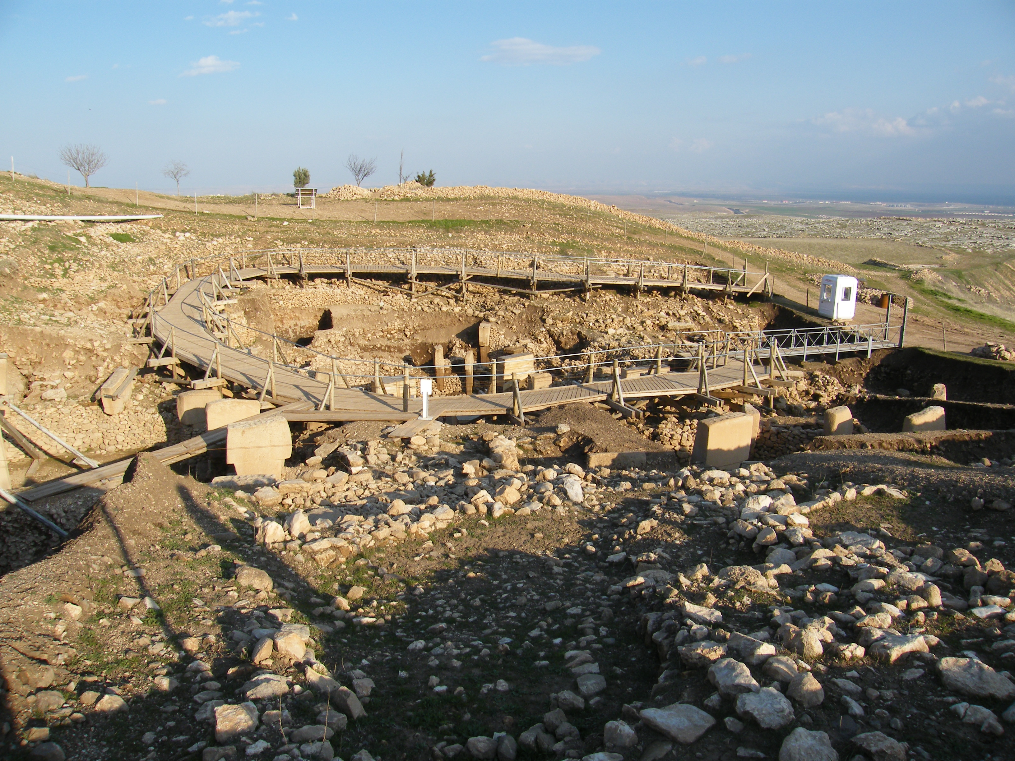 göbekli tepe ş.urfa